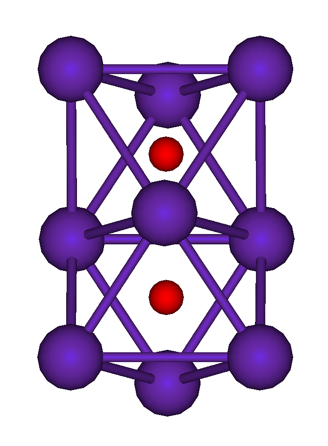 Rb9O2 cluster confacial octahedra in Rb suboxides